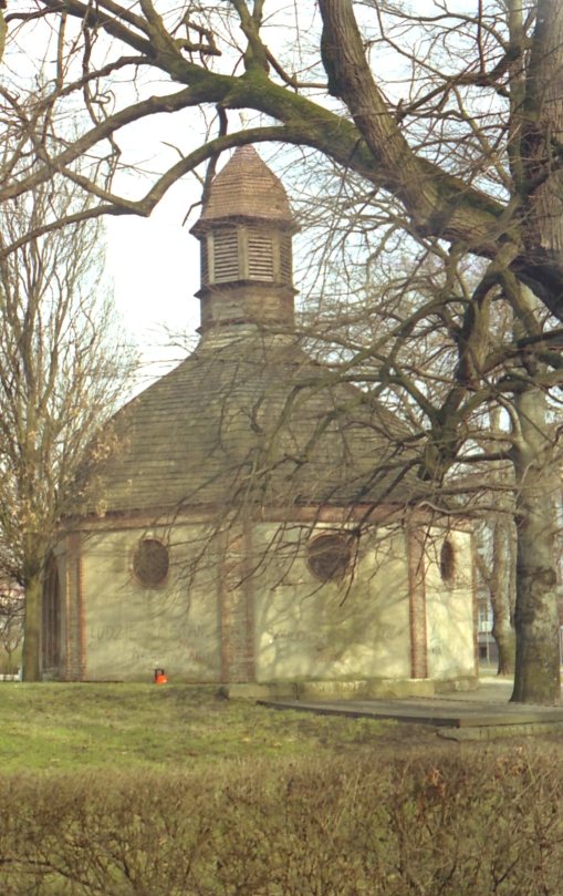 Kaplica szpitalna